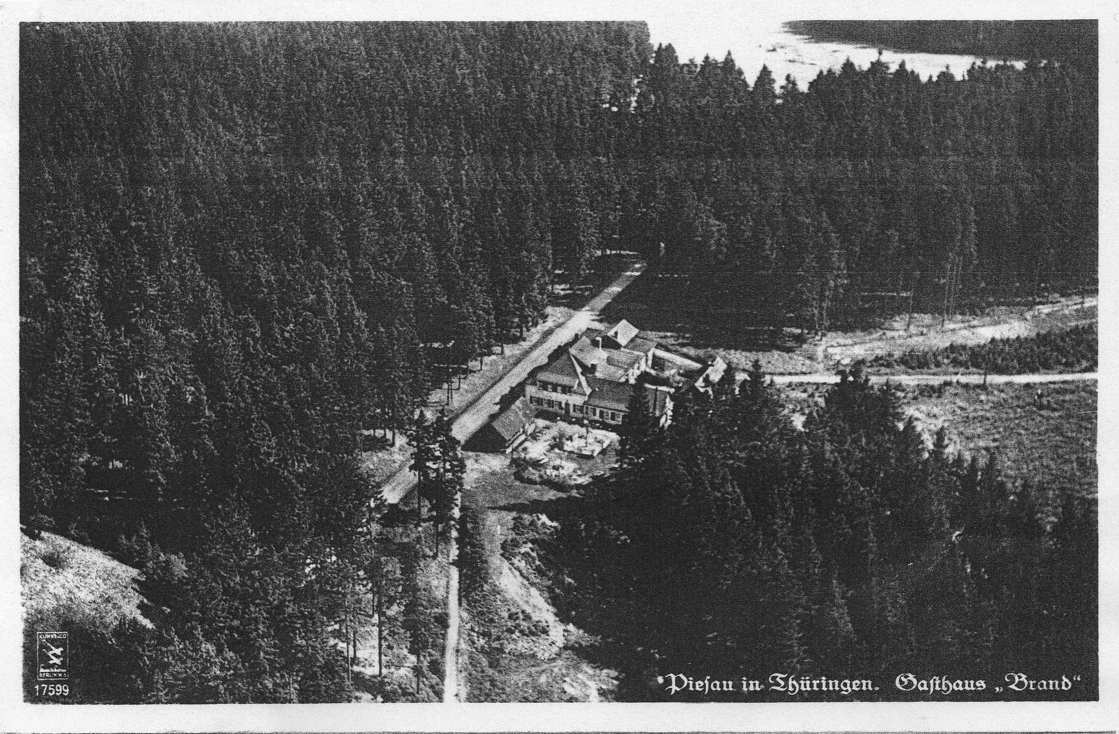 Blick auf das Hauptgebäude. ca. 1930